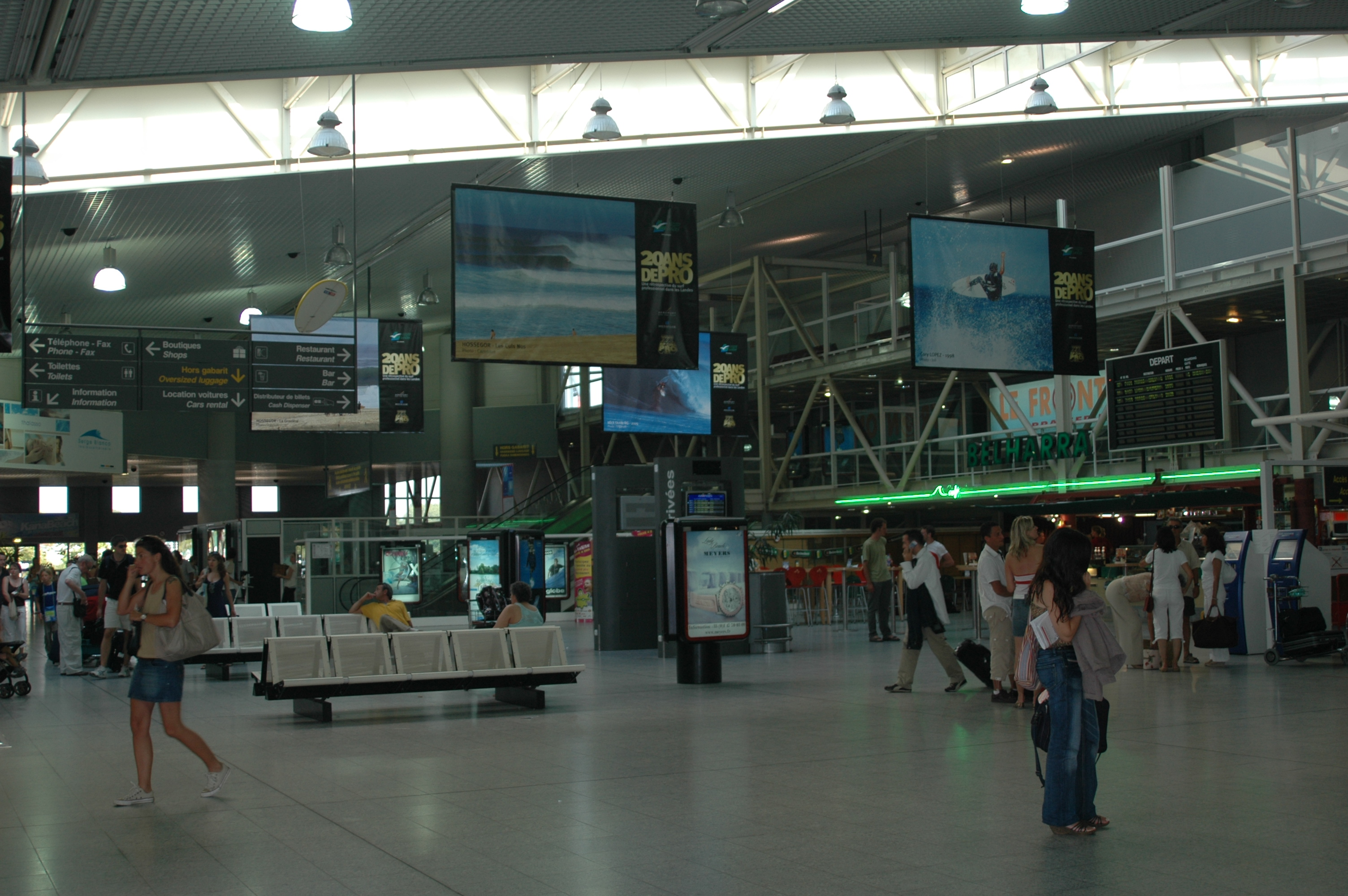 Aéroport de Biarritz. Photo prise le 17/07/06 par Harrieta171